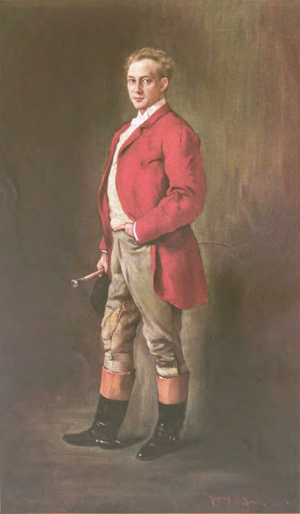 Ferdinand Bonn als Parforce-Reiter.